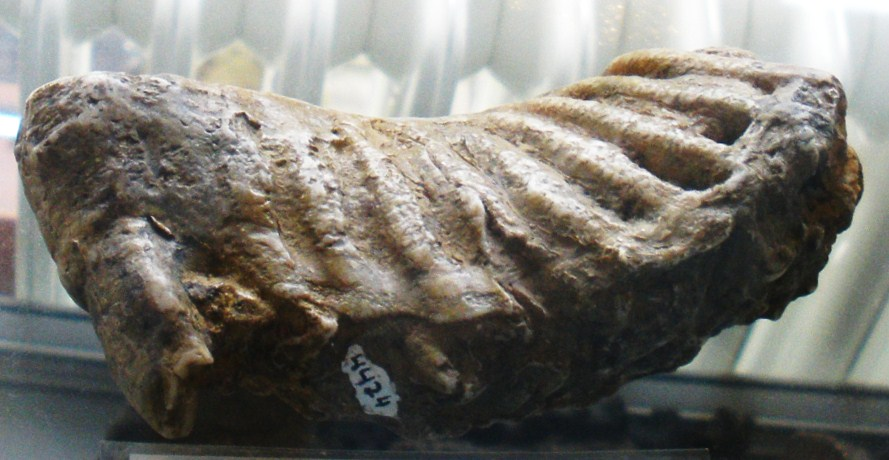 Fossil of Palaeoloxodon cypriotes, an extinct elephant- Took the photo at De Groene Poort, Boxtel